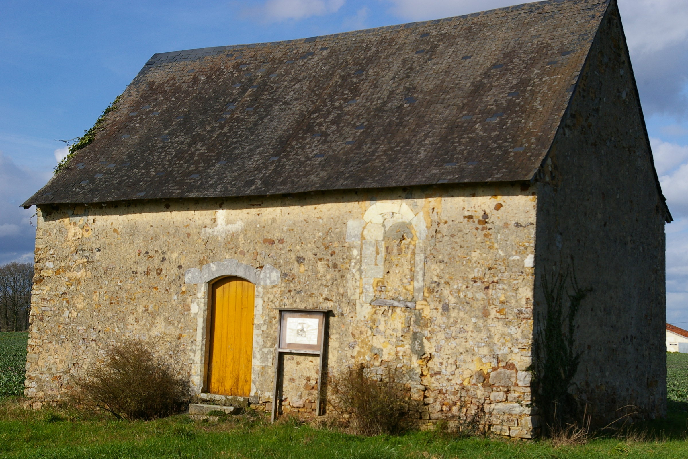 chapelle de Perrine Dugué à la Haute-Mancellière de Saint-Jean-sur-Erve (Mayenne)